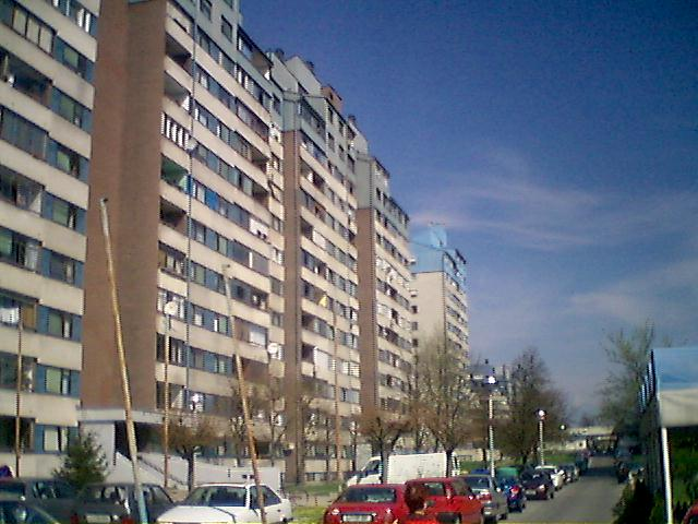 Бродарјев трг у Фужинама.Слика из мобитела.